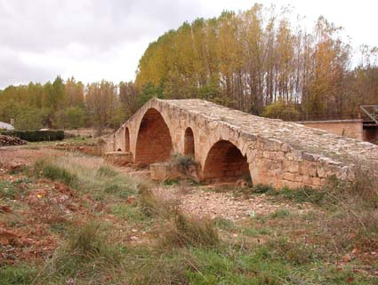 Puente Romano de Luco de Jiloca. Calamocha, Aragón, España.